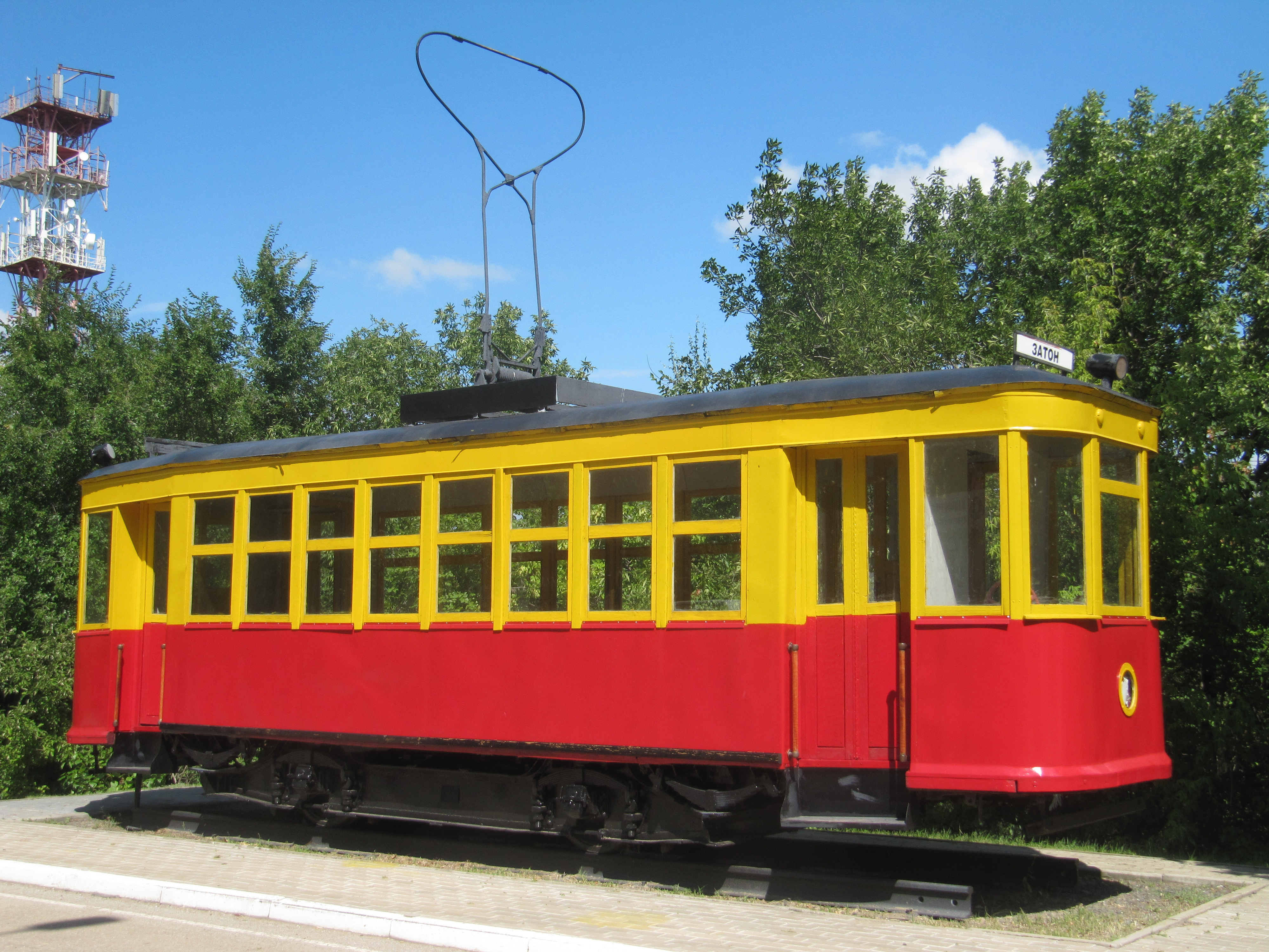 Трамвай: Моторный вагон серии Х, Парк Победы, Саратов.